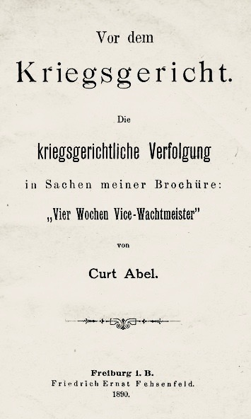 Curt Abel: Vóór de krijgsraad